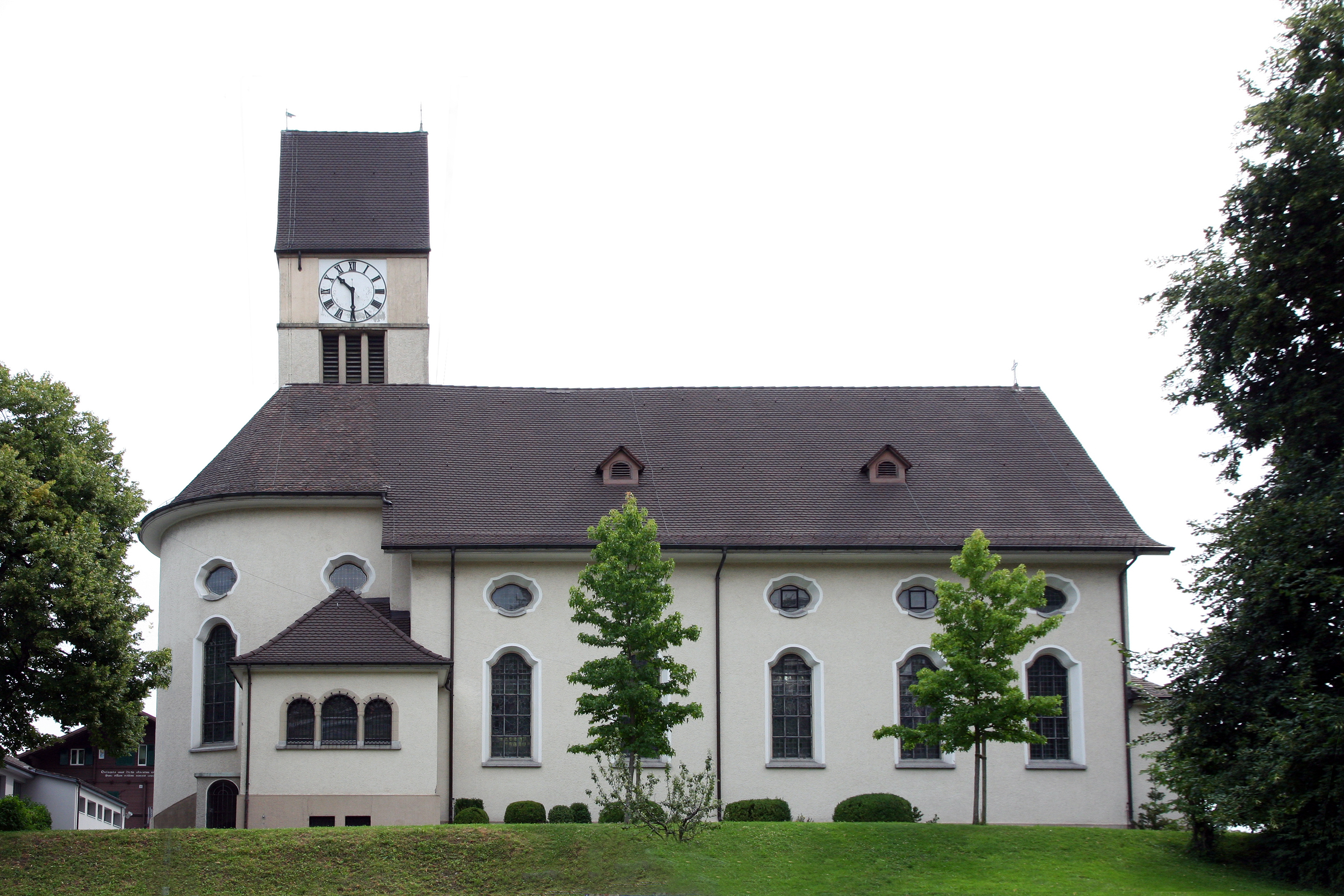 Römisch-katholische Pfarrkirche Richterswil, Ansicht von Nordwesten